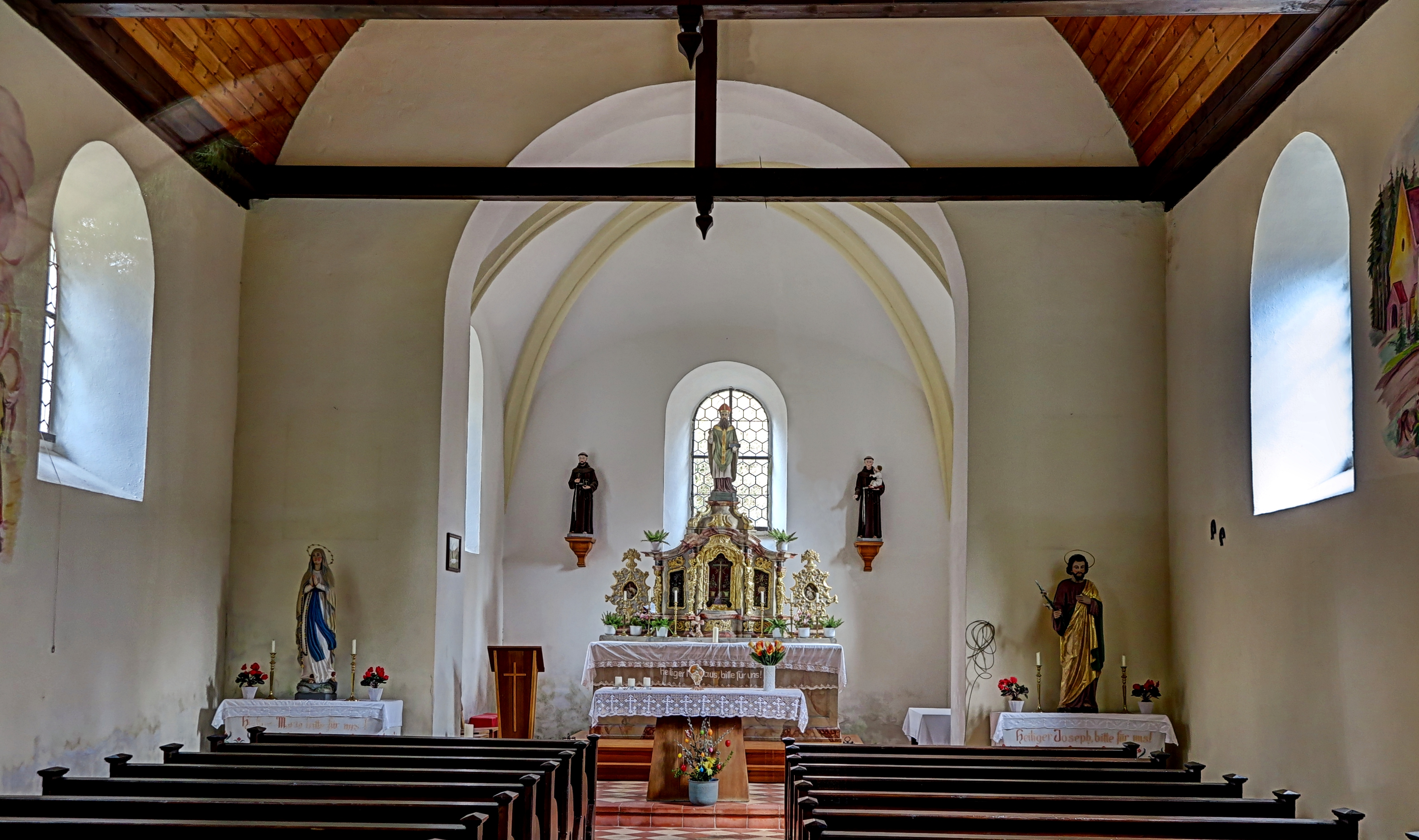 Deutschland, Bayern, Oberpfalz, Landkreis Tirschenreuth, Gemeinde Mähring, Nikolauskirche zwischen Mähring und Neualbenreuth